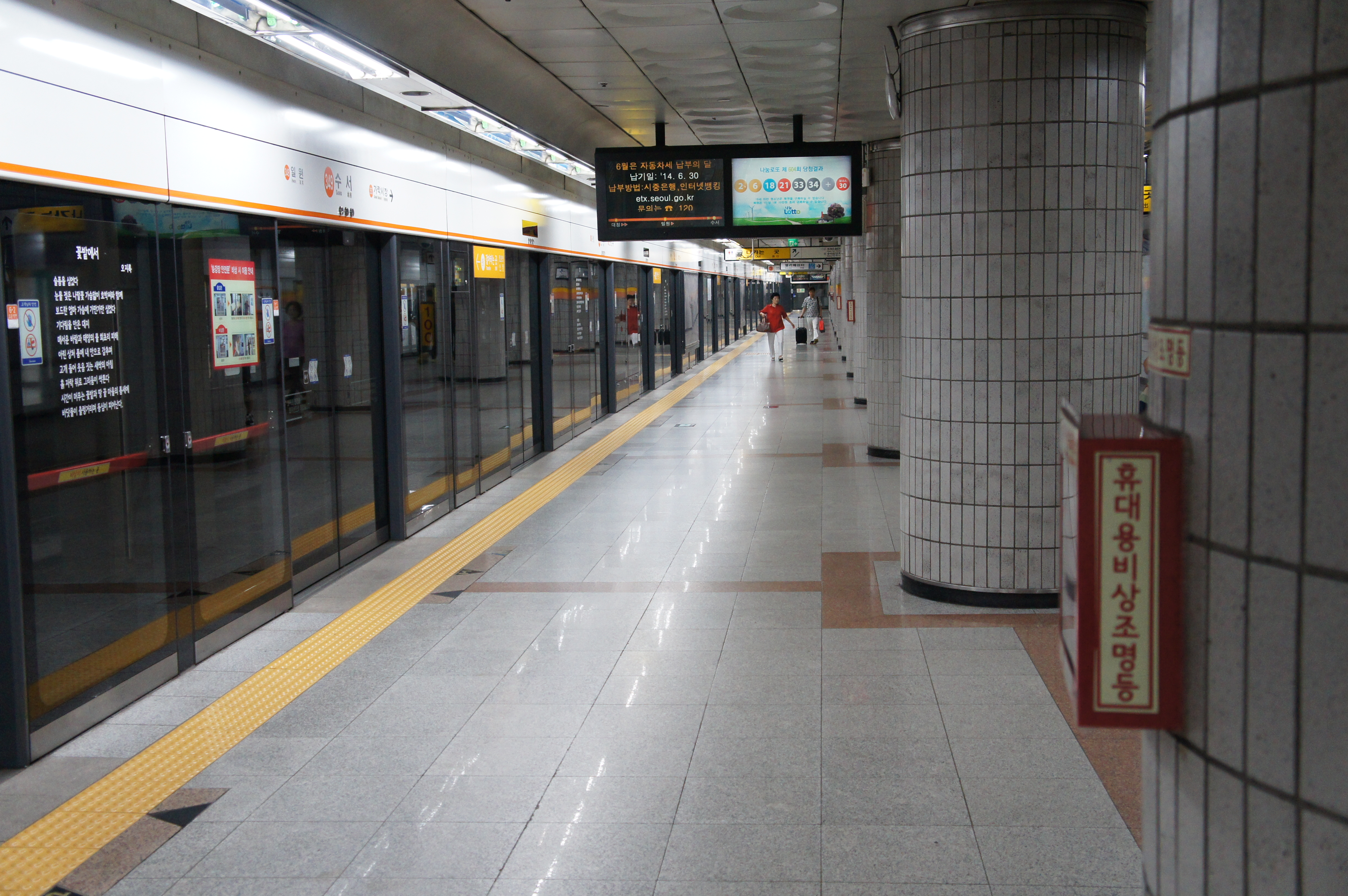 수서역 하행 승강장